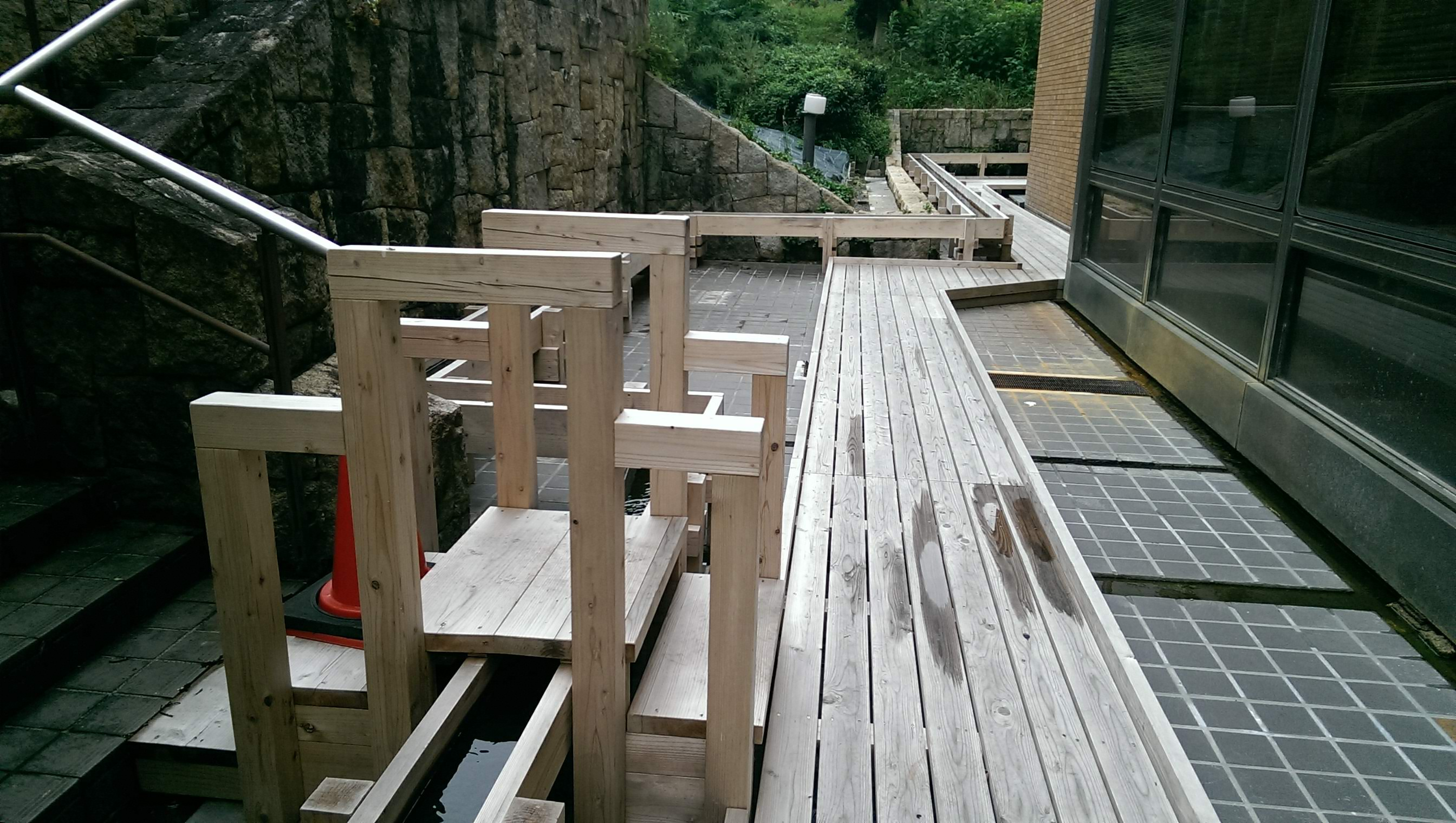 名古屋市鶴舞中央図書館の地下1階にある「つるのめぐみ」